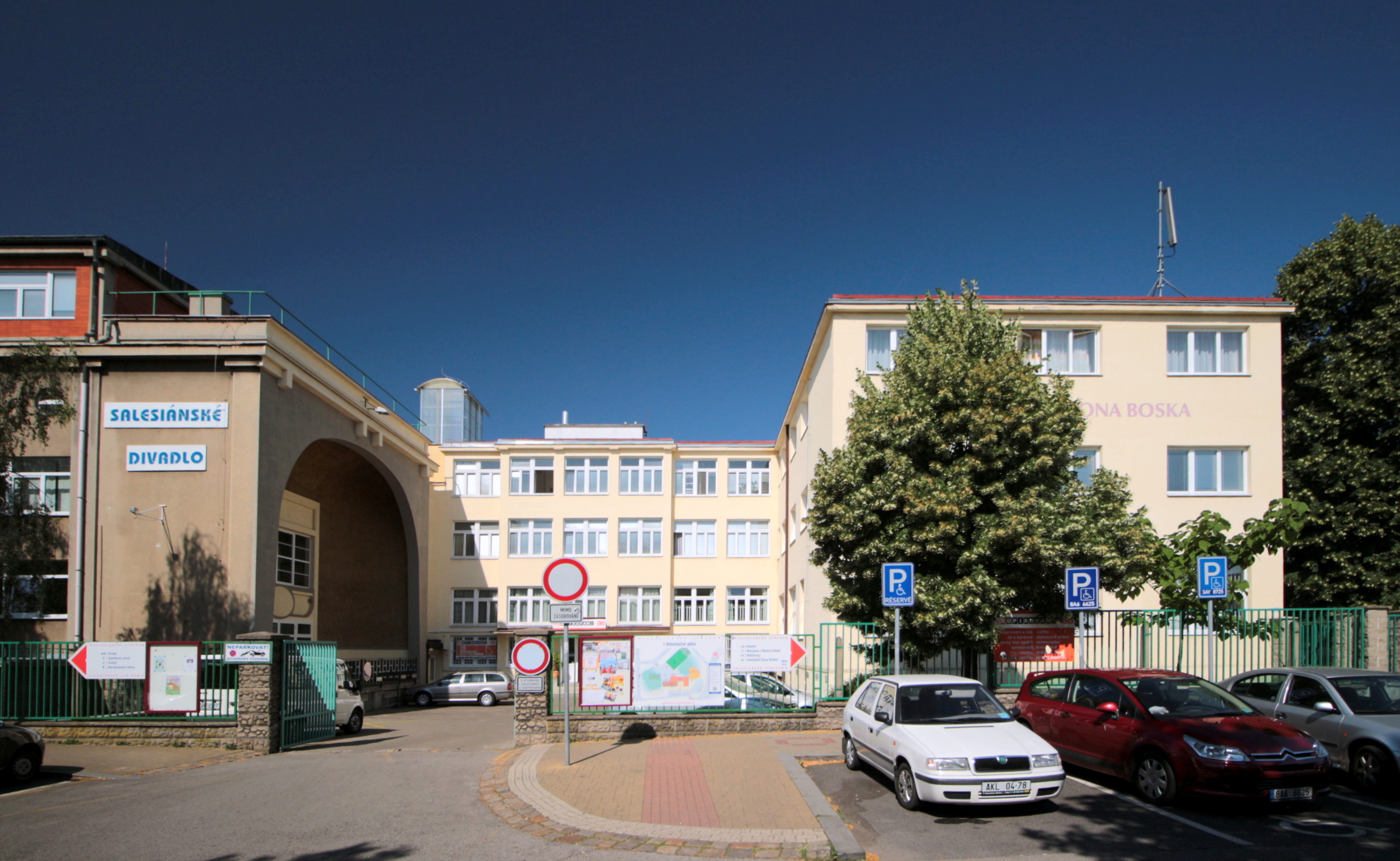 Salesiánské centrum Praha-Kobylisy